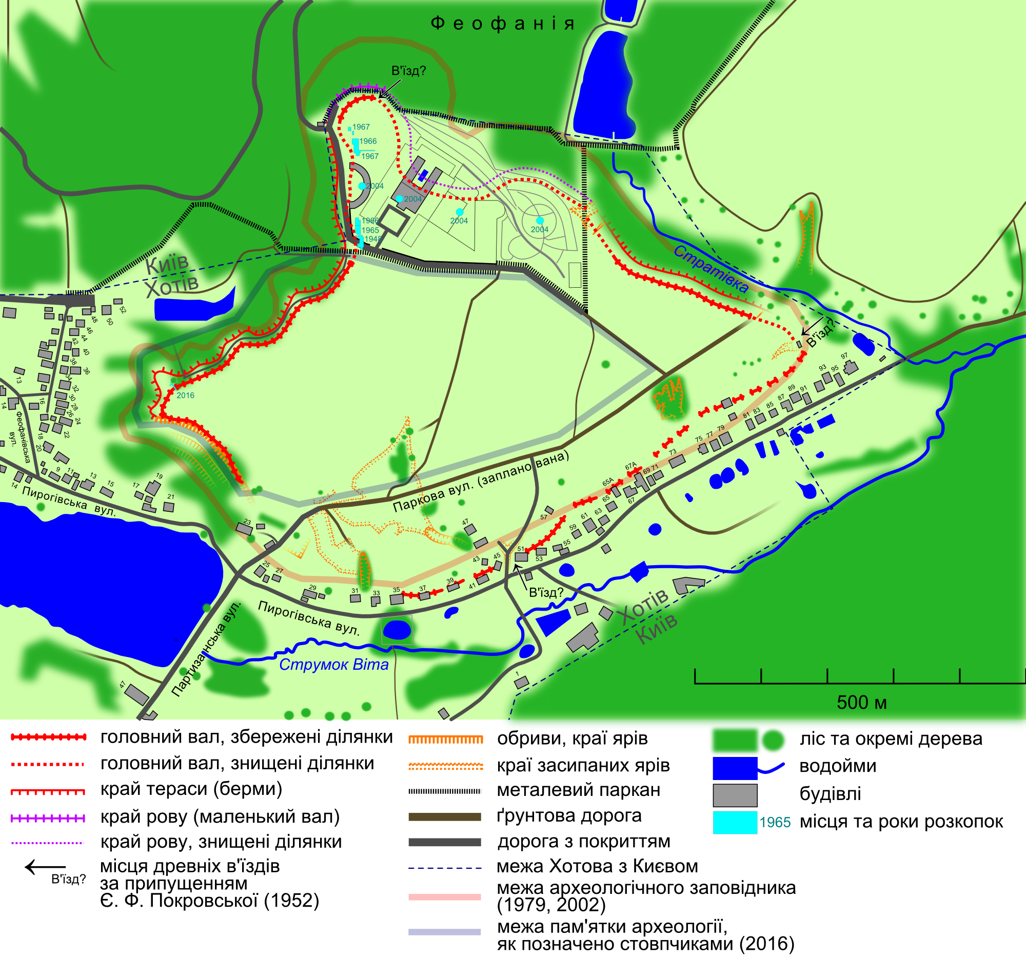 Хотівське городище скіфської доби. Село Хотів Києво-Святошинського району, на межі з Києвом. Показано укріплення, що збереглися донині, а також знищені в 21 столітті. Розташування валу показано за Дараган М., Орлюк М., Роменець А., Бондар К. Інтерпретація даних високоточної магнітної зйомки в складі археологічної ГІС (на прикладі Хотівського городища скіфської доби). 15th EAGE International Conference on Geoinformatics - Theoretical and Applied Aspects. 10-13 May 2016, Kiev, Ukraine (іншу версію див. у Покровська Є.Ф. Хотівське городище // Археологічні пам’ятки УРСР. — 1952. — Т. 4. — С. 13.). Можливі місця давніх в'їздів наведено згідно з гіпотезою Є. Ф. Покровської (Покровська Є.Ф. Хотівське городище // Археологічні пам’ятки УРСР. — 1952. — Т. 4. — С. 13., схематичний план Покровської та супутниковий знімок). Місця розкопок зображено згідно з: 1. Петровська Є. О. Ранньоскіфські пам’ятки на південній околиці Києва / В кн.: Археологія. — К.: Наукова думка, 1970. — Т. XXIV. — С. 131. 2. Дараган М., Орлюк М., Роменець А., Бондар К. Інтерпретація даних високоточної магнітної зйомки в складі археологічної ГІС (на прикладі Хотівського городища скіфської доби). 15th EAGE International Conference on Geoinformatics - Theoretical and Applied Aspects. 10-13 May 2016, Kiev, Ukraine. Шурфи не показано. Межі археологічного заповідника "Хотівське городище в межах укріплень скіфського часу" (розпорядження КМДА від 17.05.2002 р. № 979 "Про внесення доповнень до рішень виконкому Київської міської ради народних депутатів від 16.07.1979 р. № 920 «Про уточнення меж історико-культурних заповідників і зон охорони пам'яток історії та культури в м. Київ») показано за Євсюков Т., Опенько І. Моніторинг особливо цінних земель із застосуванням технологій ДЗЗ та ГІС // Вісник Львівського національного аграрного університету. Сер : Економіка АПК. - 2013. - № 20(2). - С. 5. Межу Хотова з Києвом зображено згідно з генпланом с. Хотів (